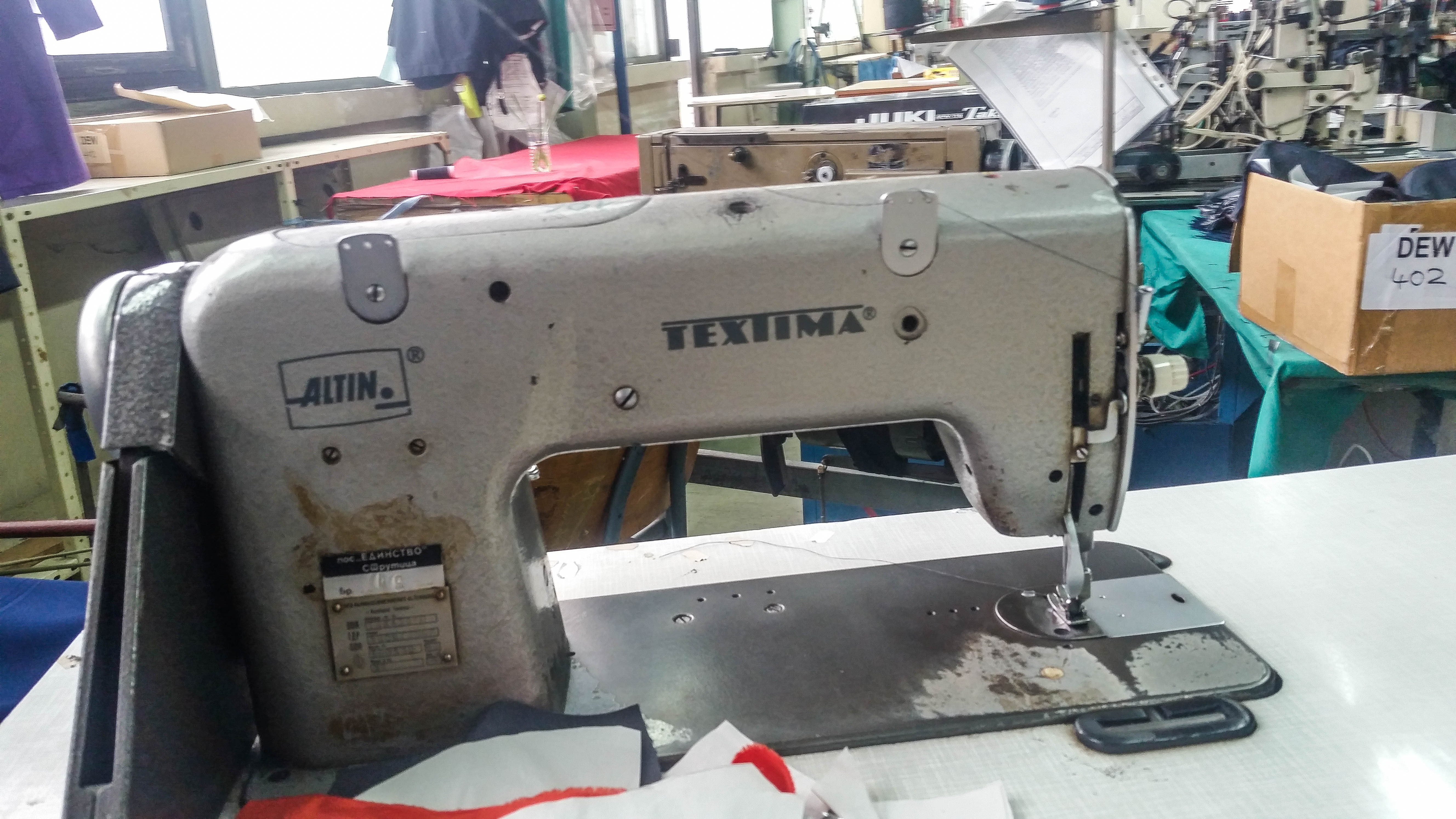 Индустриска машина за шиење Textima